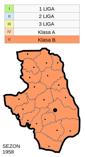 Jagiellonia w sezonie 1958 - mapa klubów